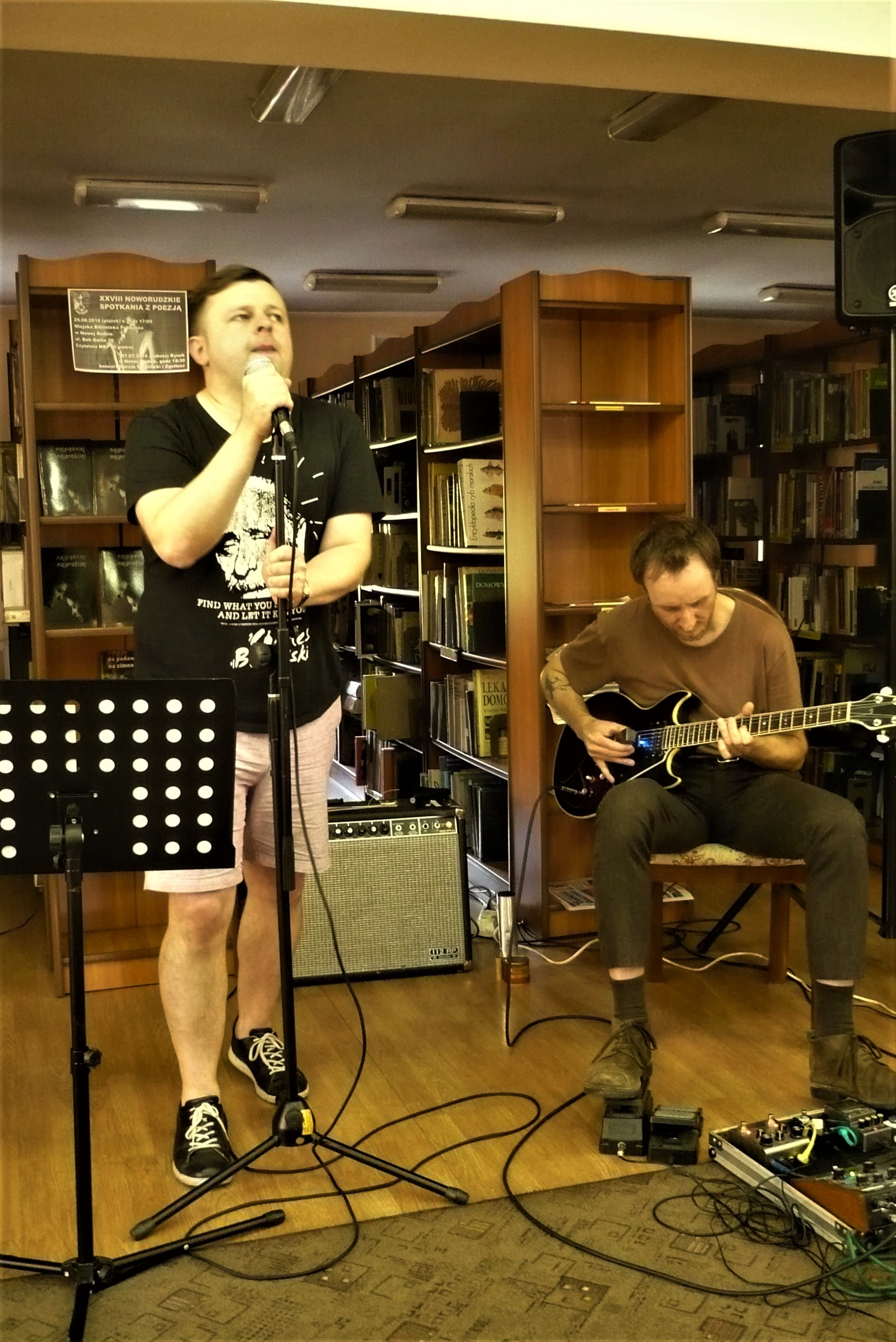 Wojciech Brzoska (stoi) i Łukasz Marciniak podczas koncertu, XXVIII Noworudzkie Spotkania z Poezją w Miejskiej Bibliotece Publicznej w Nowej Rudzie